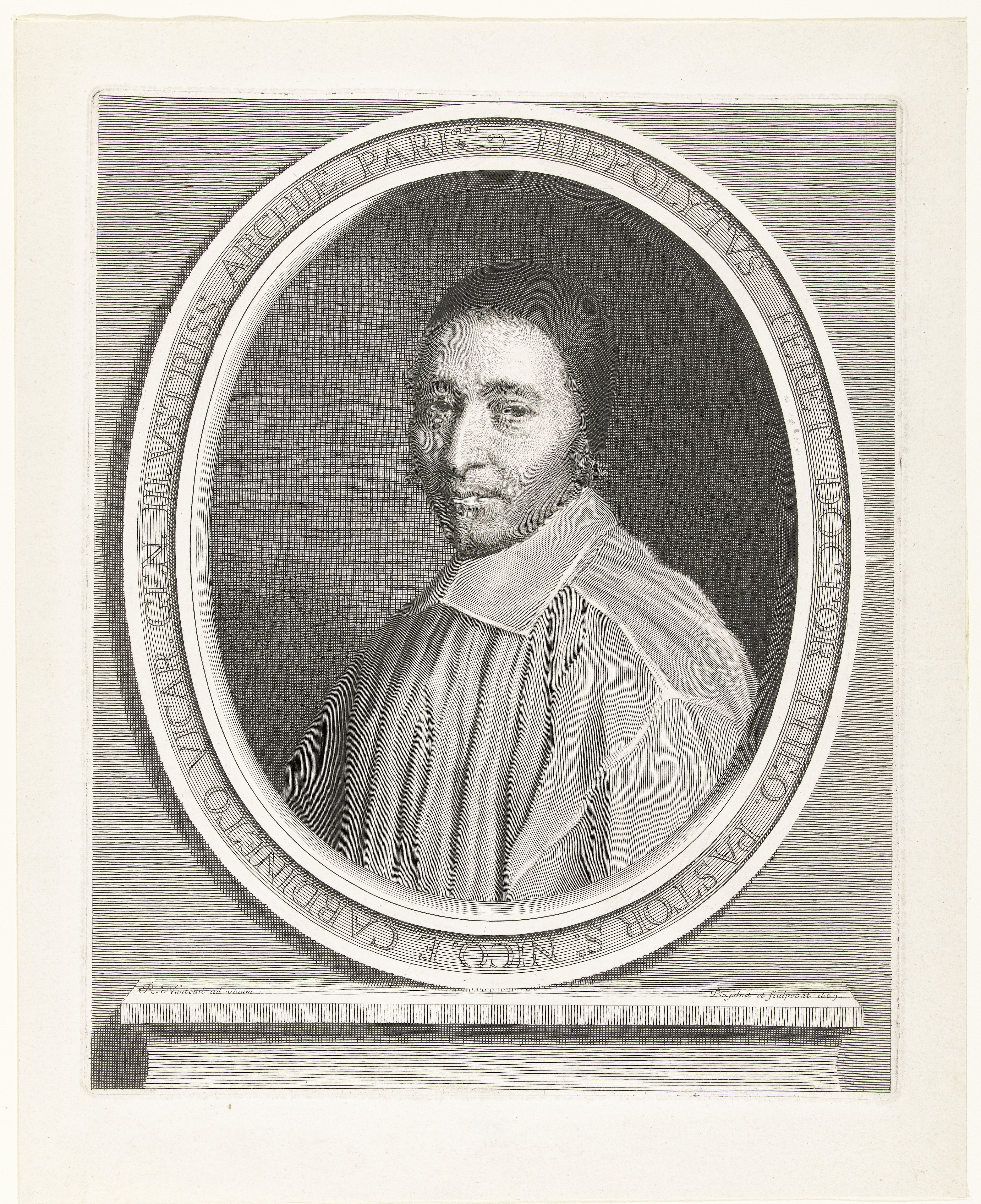 IdentificatieTitel(s): Portret van Hippolyte FéretHippolytus Feret doctor theo. pastor s.ti Nico. e cardineto vicar. gen. illustriss. archie. pariensis. (titel op object)Objecttype: prent Objectnummer: RP-P-1949-363Catalogusreferentie: Robert-Dumesnil 95-1(2)Petitjean & Wickert 73-1(2)Opschriften / Merken: verzamelaarsmerk, verso midden onder, gestempeld: Lugt 2228Omschrijving: Portret van de priester Hippolyte Féret, in een ovale omlijsting met tekst, staand op een piëdestal.VervaardigingVervaardiger: prentmaker: Robert Nanteuil (vermeld op object)naar eigen ontwerp van: Robert NanteuilPlaats vervaardiging: FrankrijkDatering: 1669Fysieke kenmerken: gravureMateriaal: papier Techniek: graveren (drukprocedé)Afmetingen: plaatrand: h 356 mm × b 290 mmOnderwerpWie: Hippolyte FéretVerwerving en rechtenVerwerving: aankoop 1949Copyright: Publiek domein